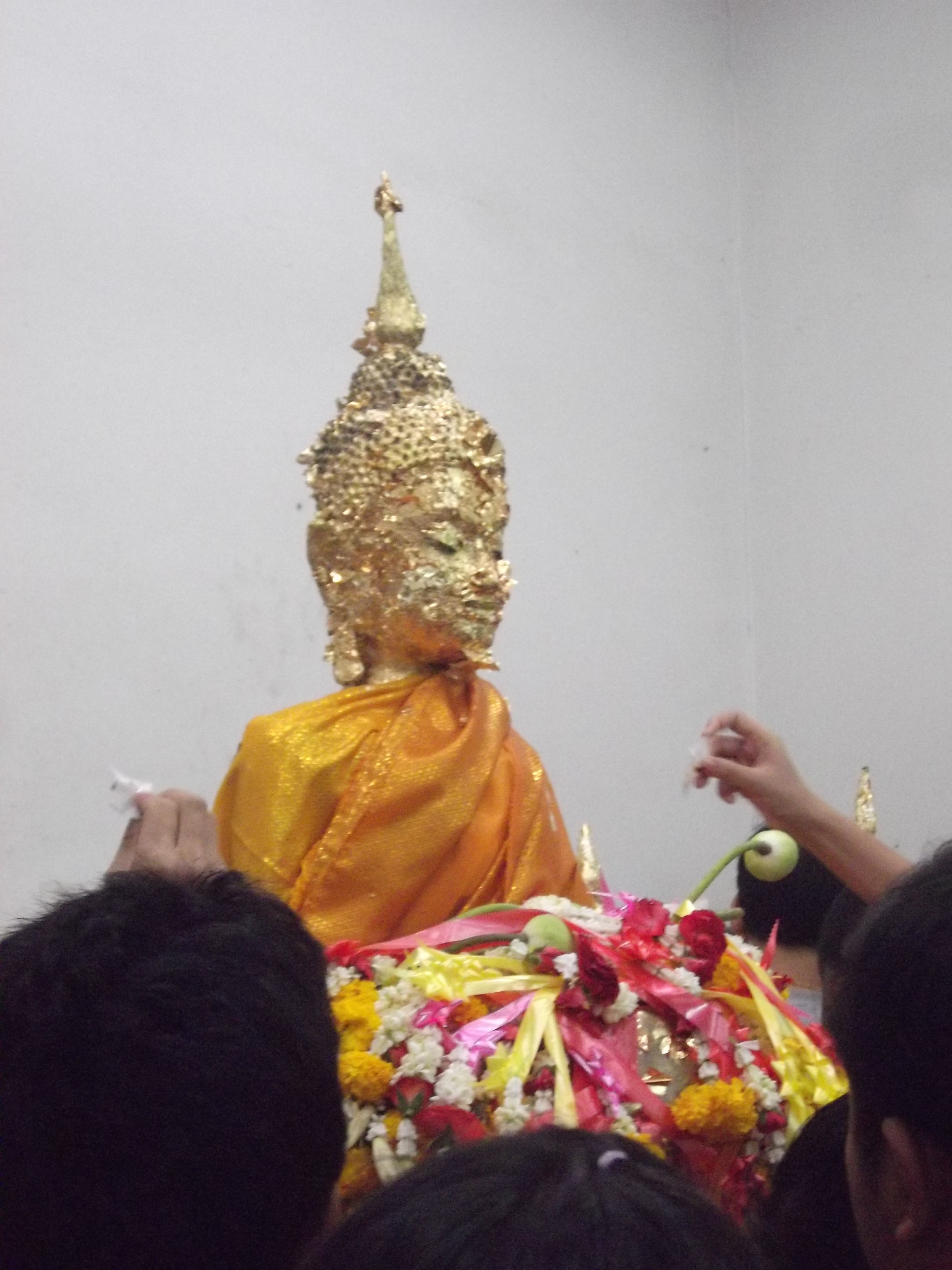 วัดบ้านแหลม(วัดเพชรสมุทรวรวิหาร)